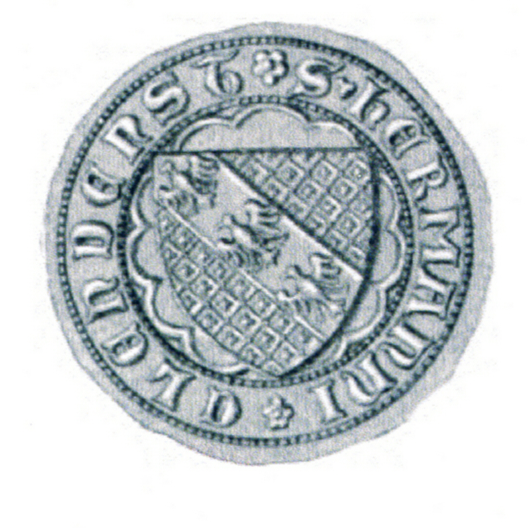 Siegel des Ratmannes Hermannus Clendenst († 1338). Das Siegel stammt aus der Zeit um 1328. Siehe Emil Ferdinand Fehling: Lübeckische Ratslinie, Nr. 319 (Hermann Klendenst).